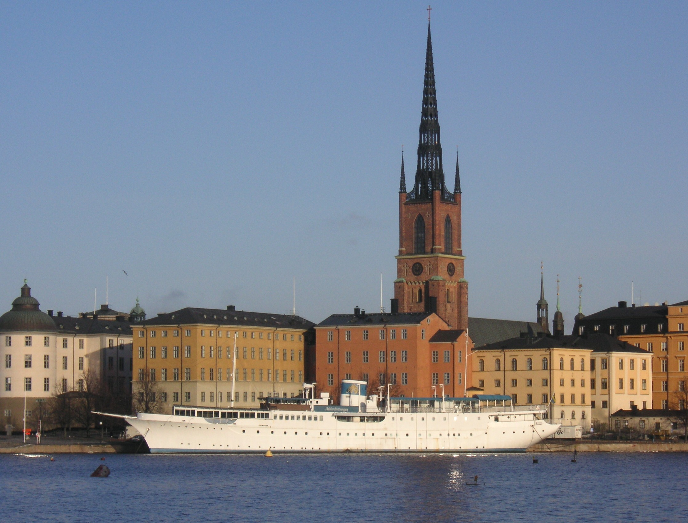 Riddarholmen och MS Mälardrottningen i Stockholm